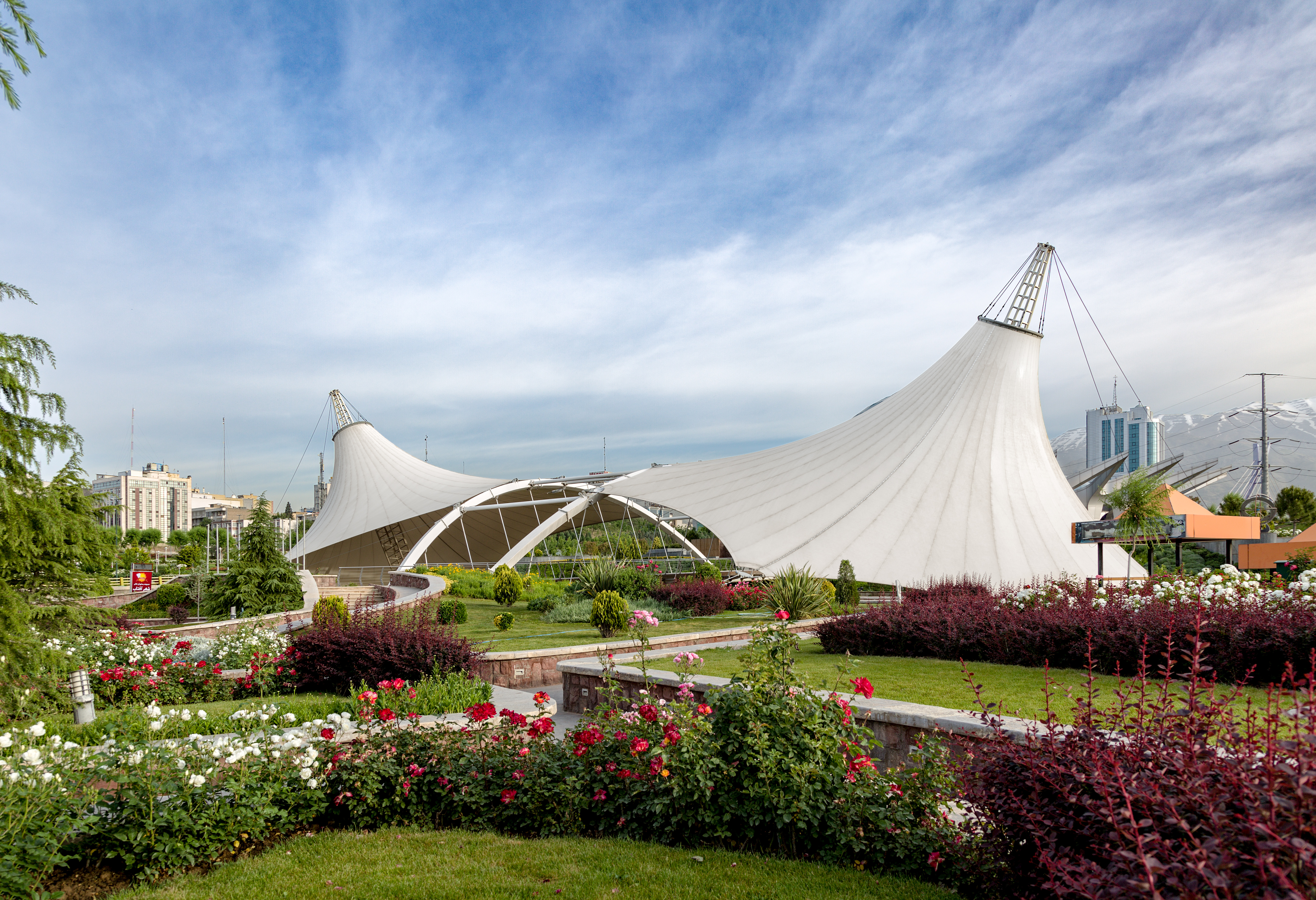 سازه های پارچه ای دیبا